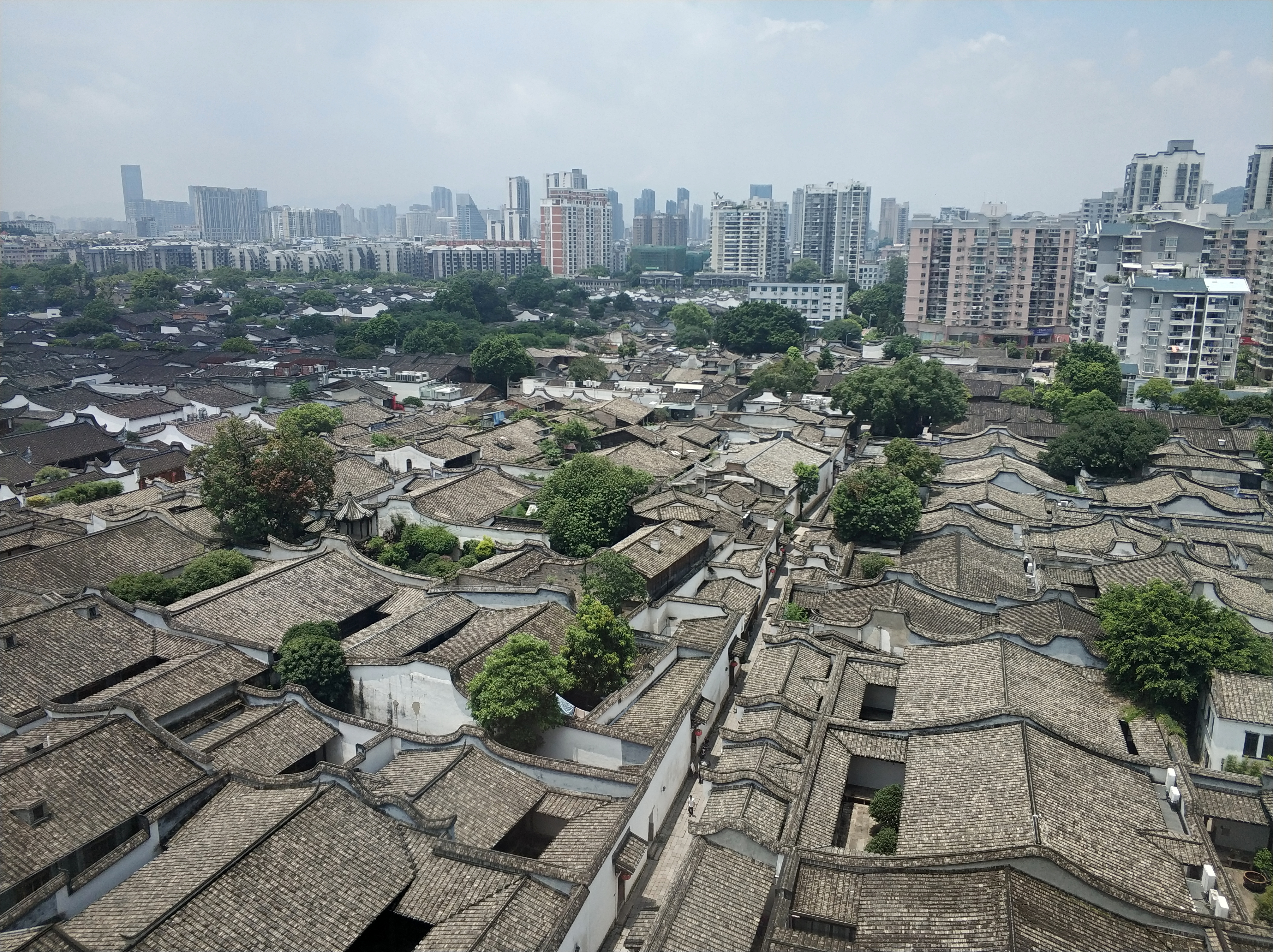 中文（中国大陆）: 福州三坊七巷